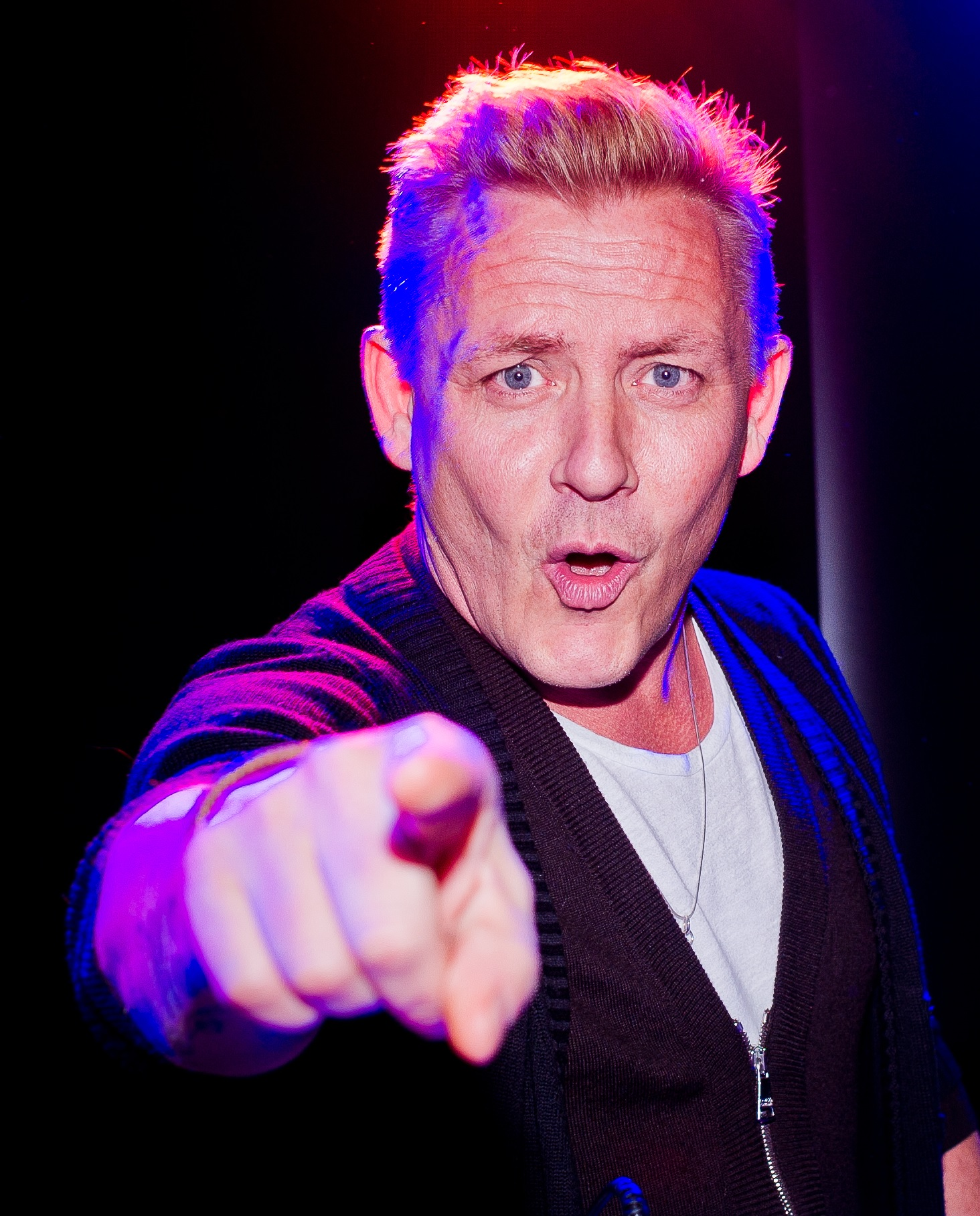 Discjockey Robert Wåtz vid invigningen av Friends Arena i Solna.